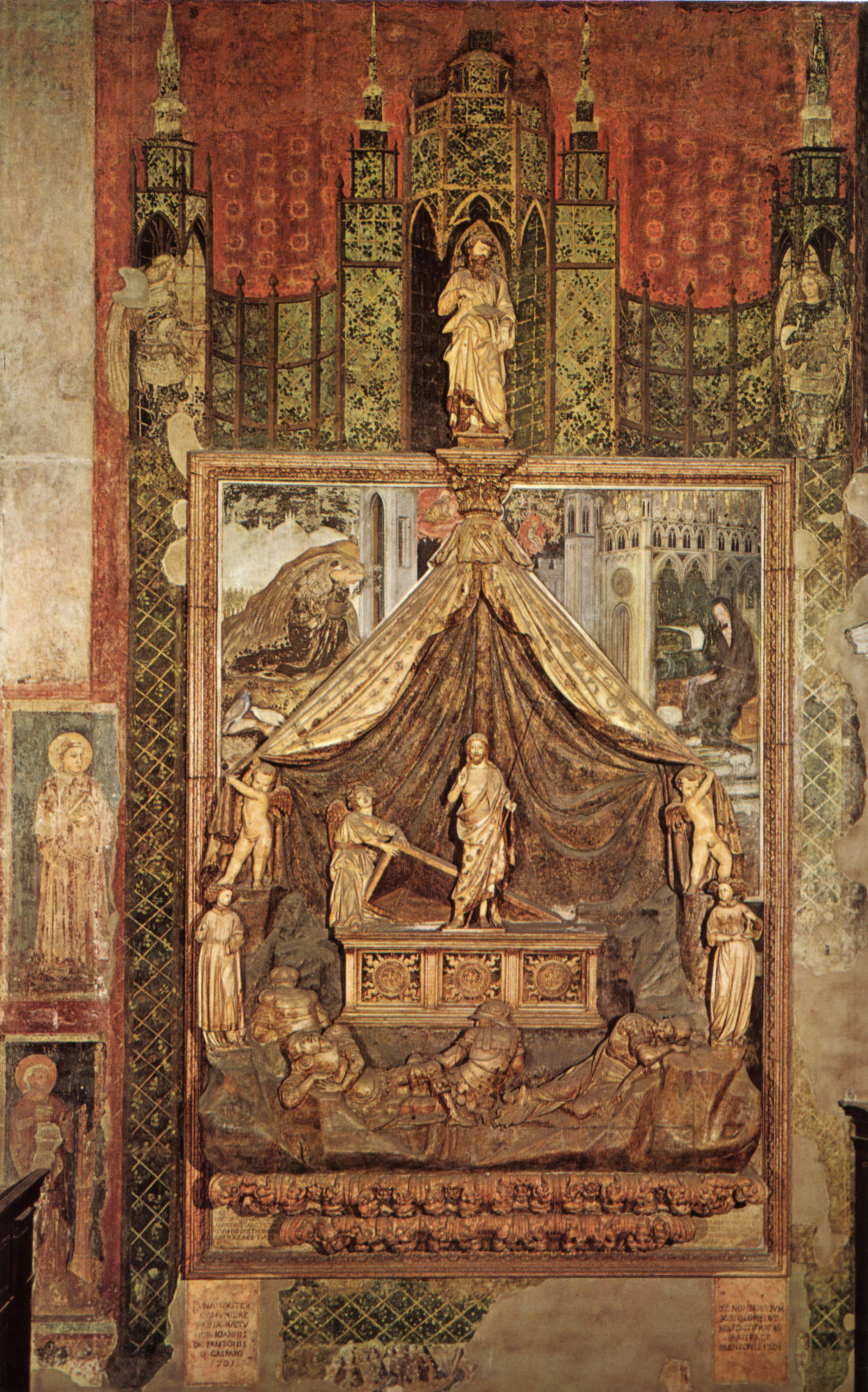 Grabdenkmal für Niccolò Brenzoni mit Skulpturengruppe der Auferstehung Christi